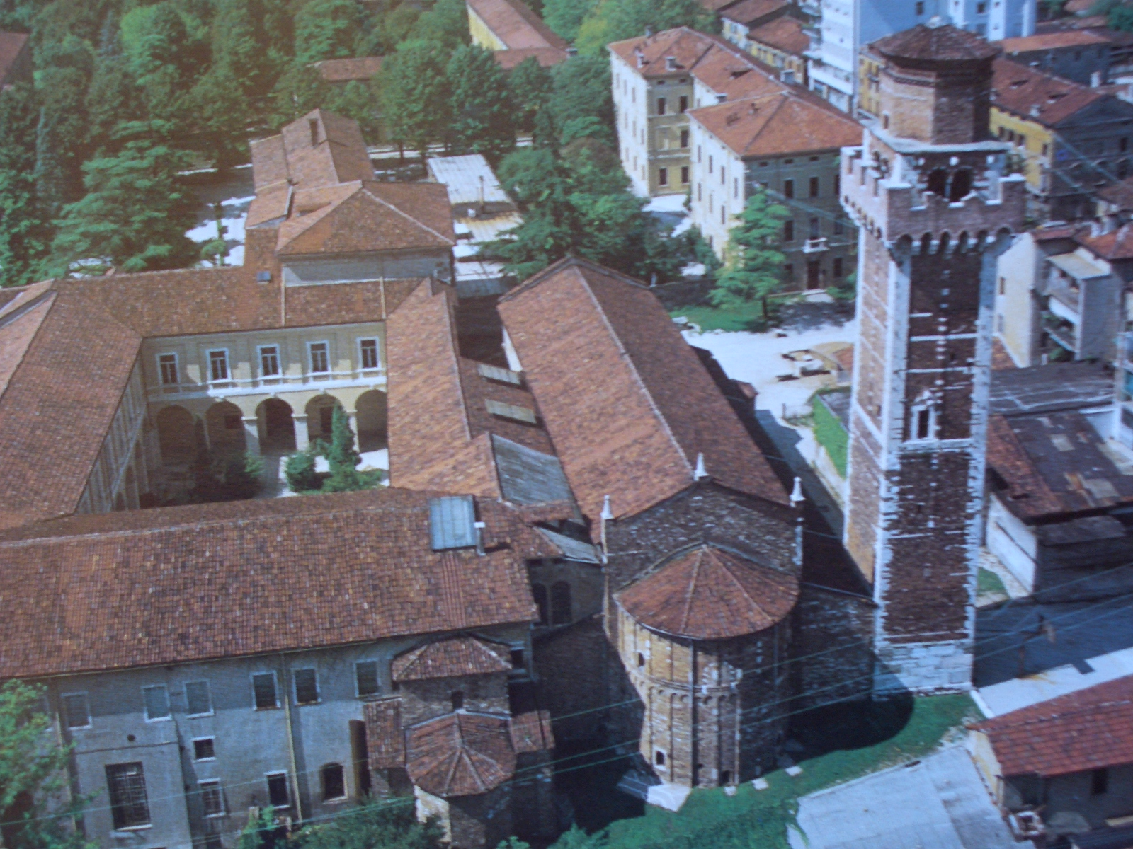 Foto aerea basilica Santi Felice e Fortunato (Vicenza)